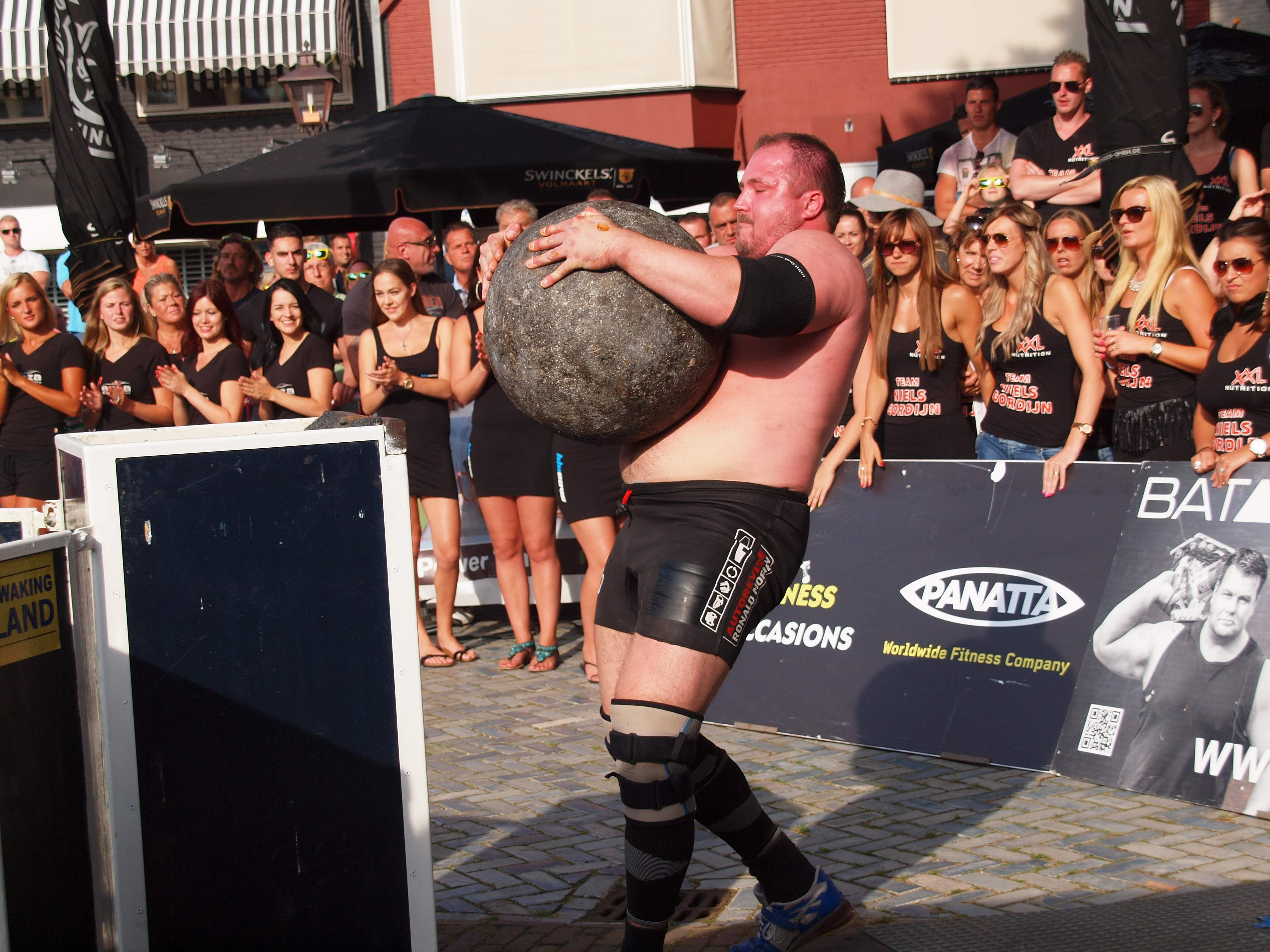 Originele foto, gemaakt op 18 juli door Doetze Hovius, met Jitse Kramer in actie, vlak voor het behalen van zijn 2e titel (Sterkste Man van Nederland).